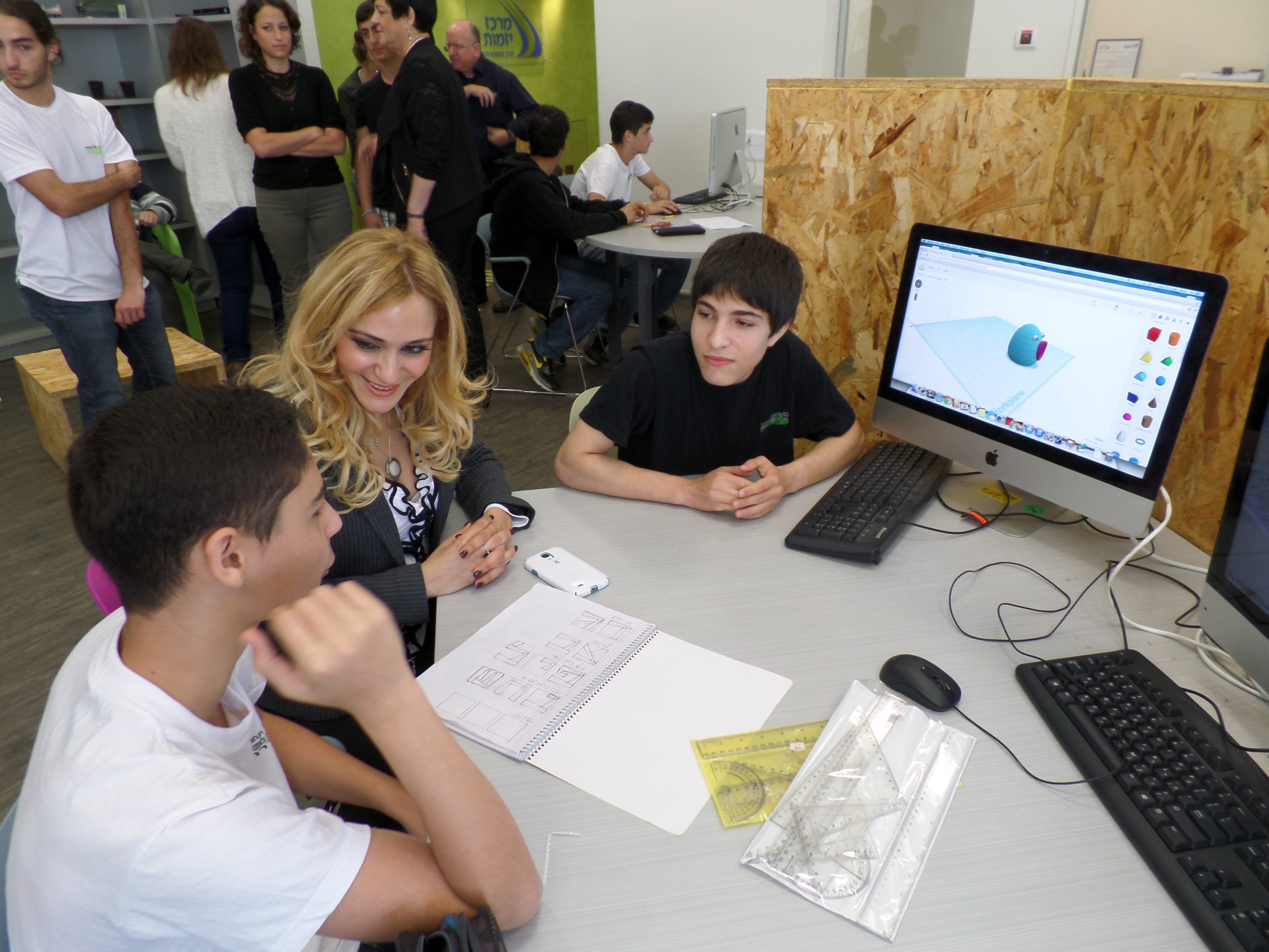 עו"ד רוית דום, מנכ"לית קבוצת עמל, עם תלמידים במרכז היזמות של עמל בחדרה